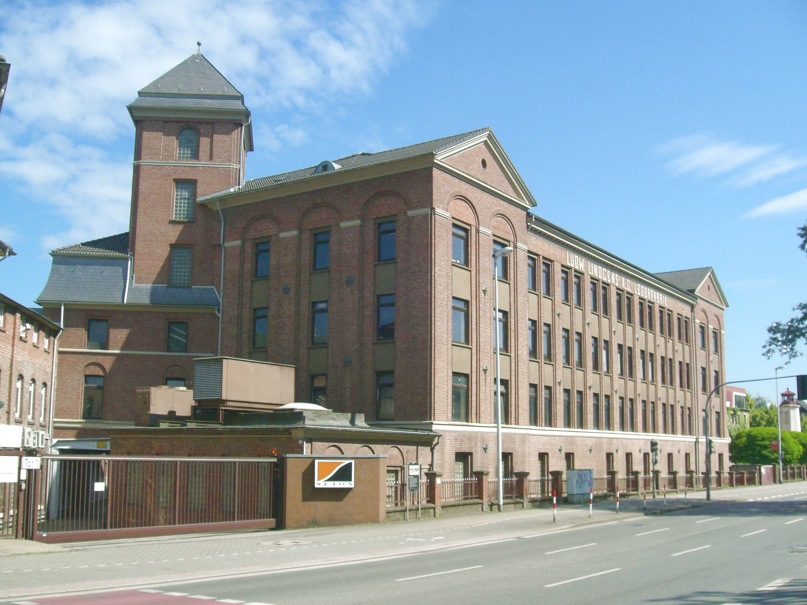 Lindgens Leder in Mülheim